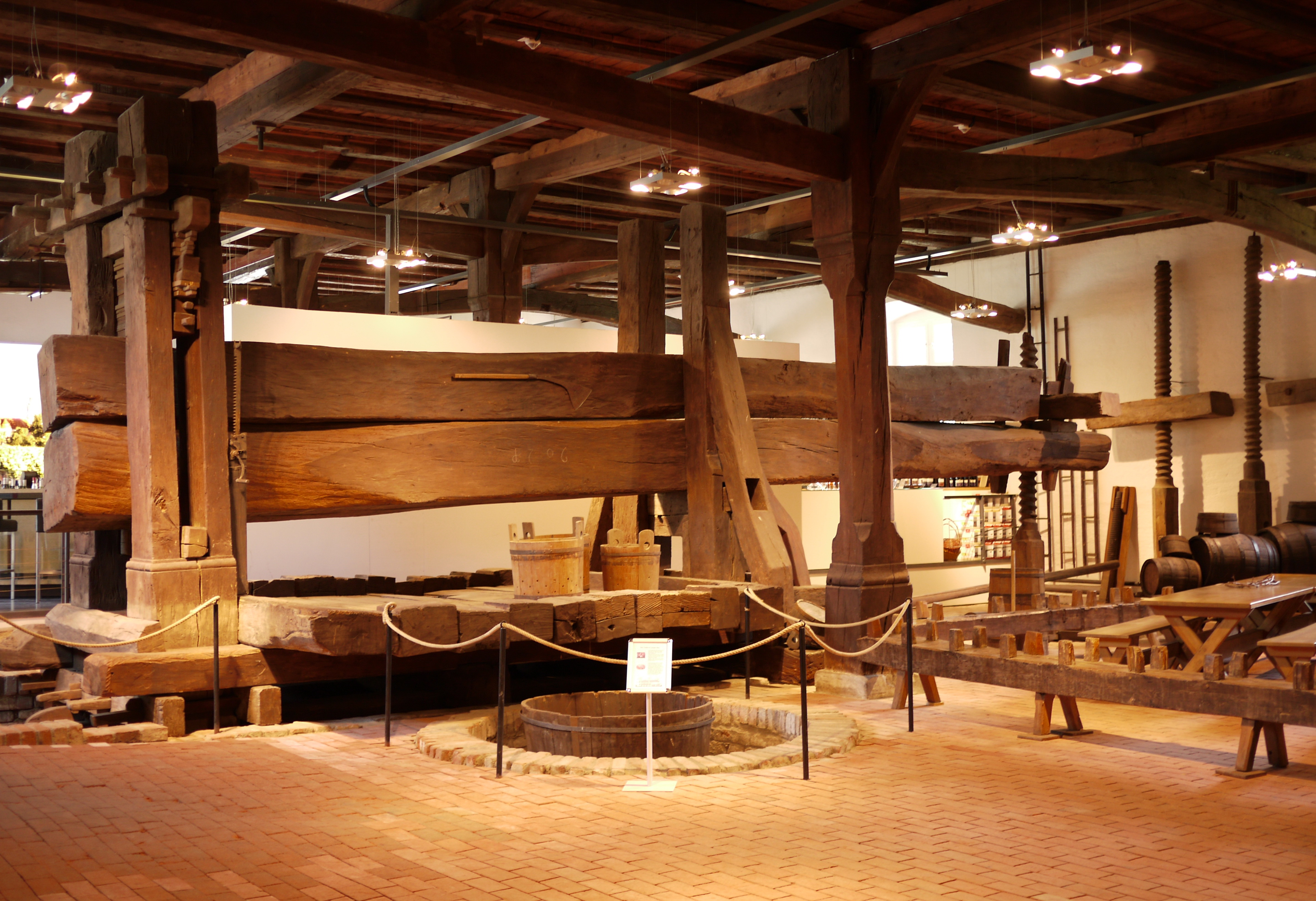 Torkel (Weinpresse) im Salemer Schloss